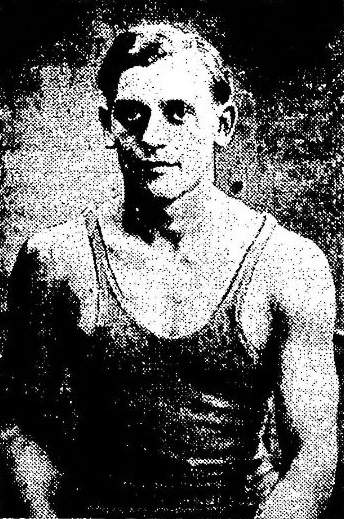 Le plongeur français Roger Heinkele en février 1935, à Londres.